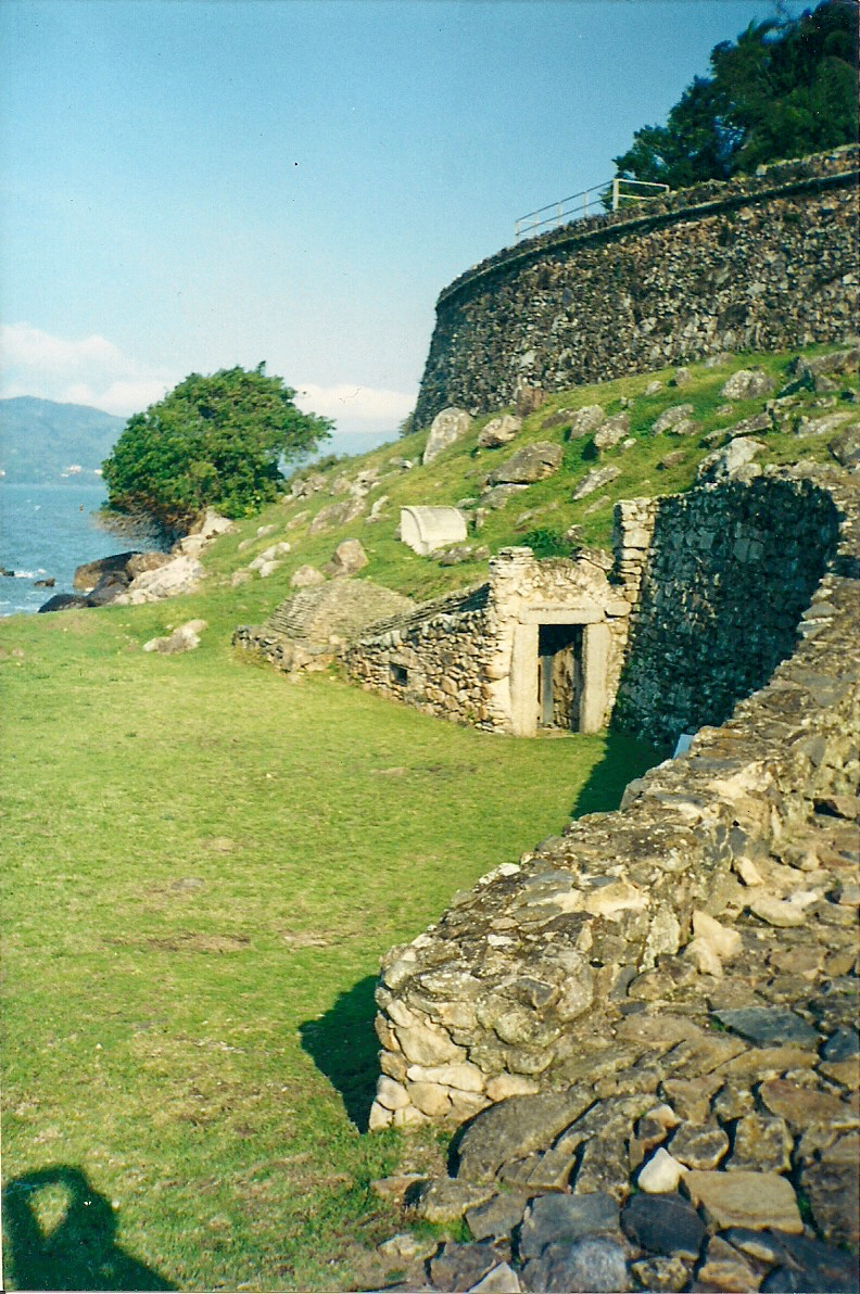 Fortaleza de Santo Antônio de Ratones, ilha de Ratones Grande, SC, Brasil: aspecto da porta da Cisterna.